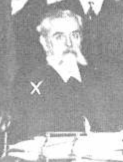 Los inquilinos contra los caseros.